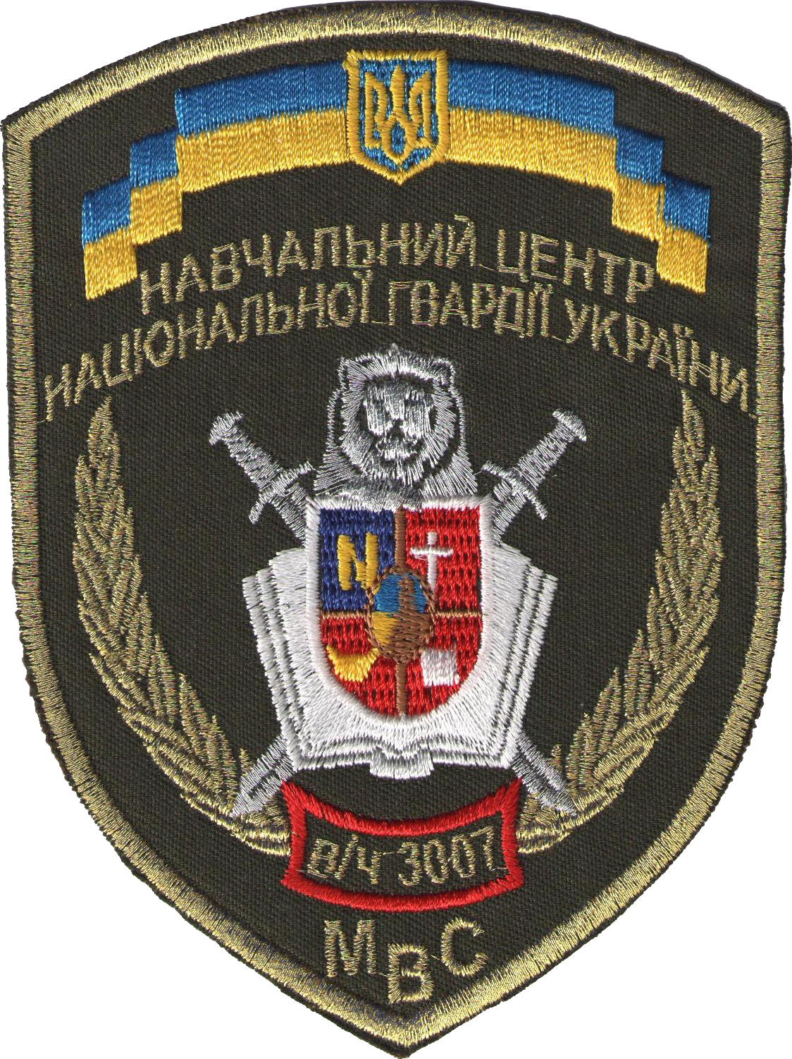 Нарукавний знак, Навчальний центр Національної гвардії України